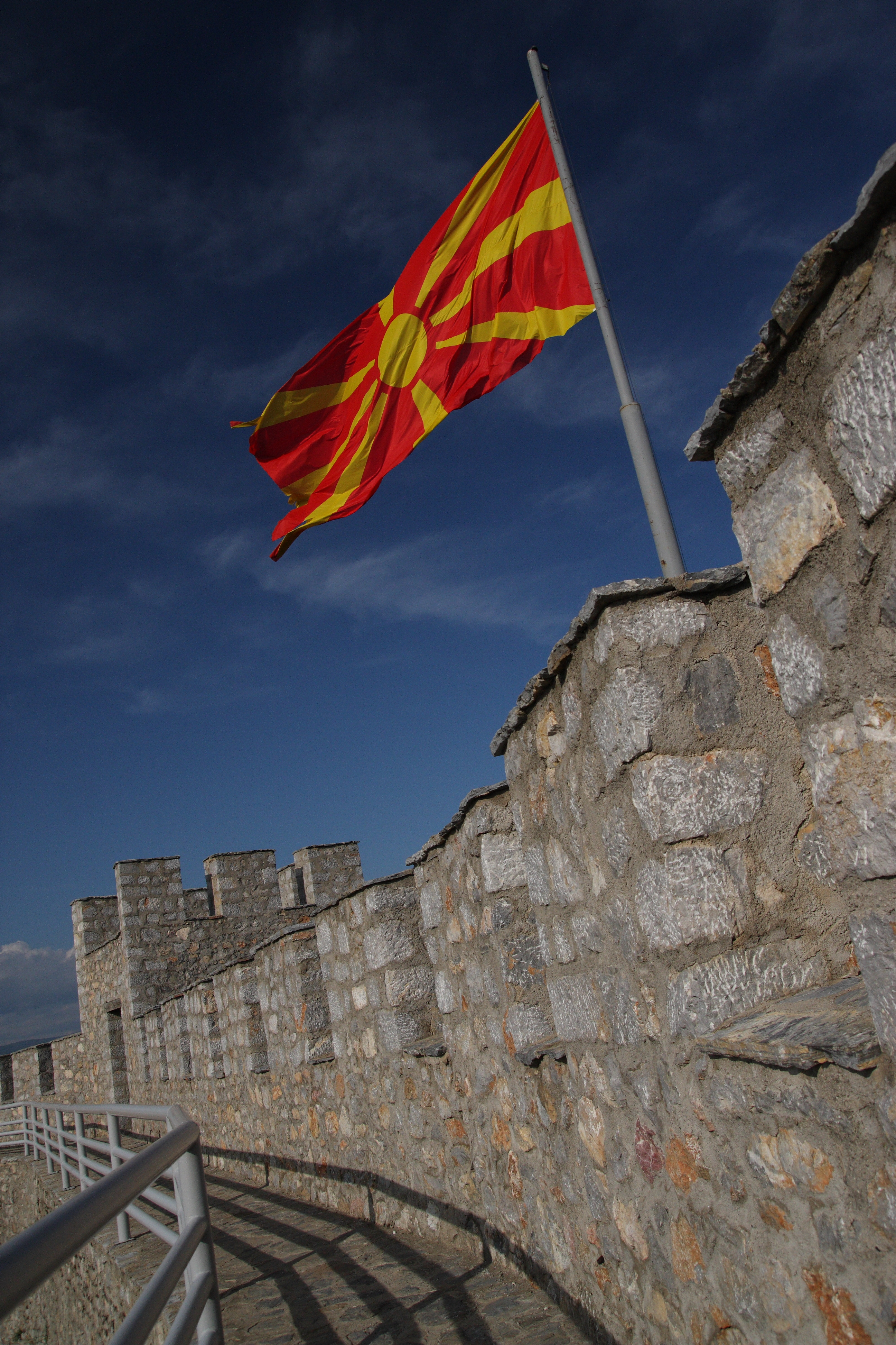 Samuels Fortress, Ohrid